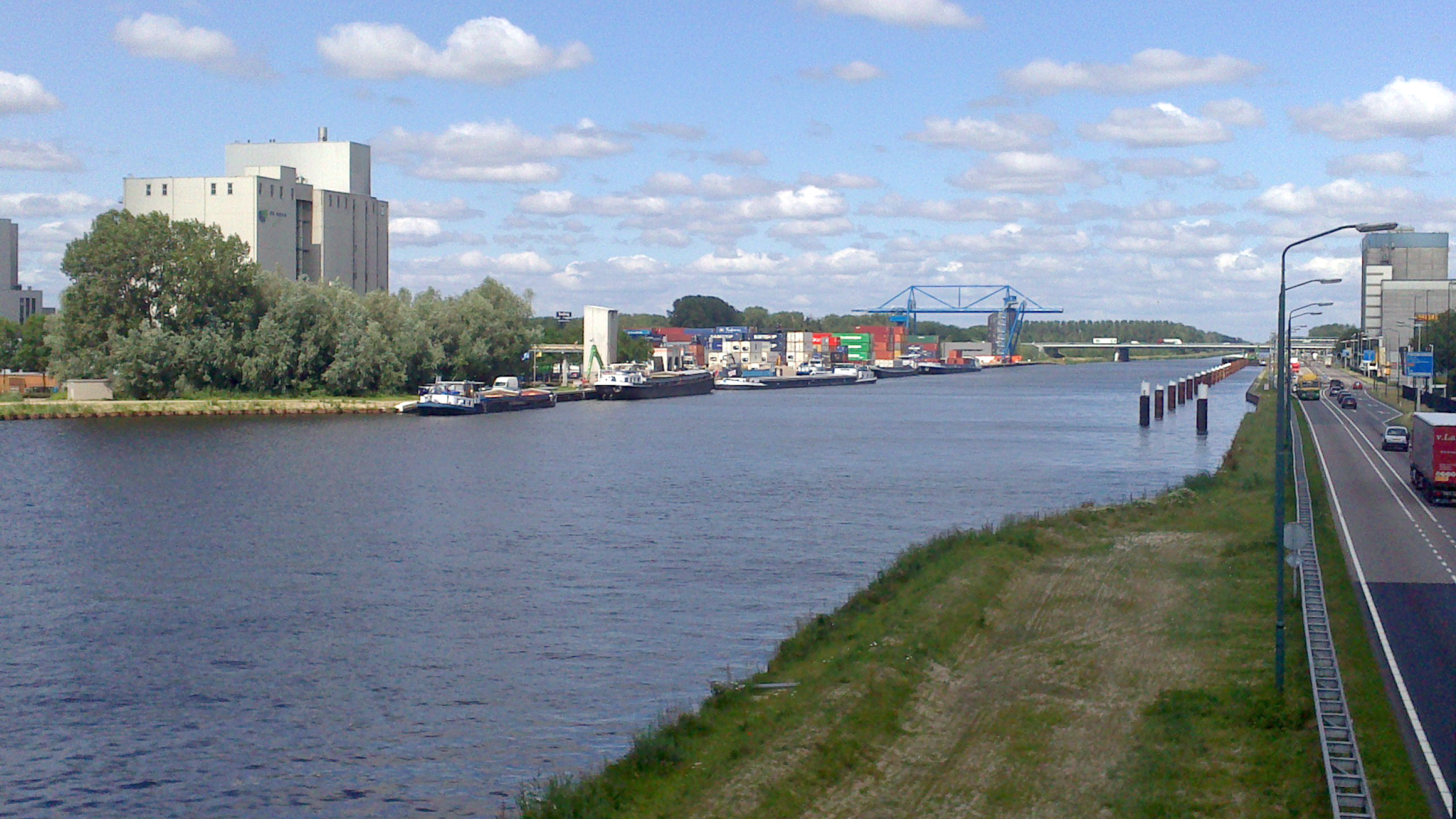 Foto van de 'Langshaven' in Veghel, met loskades aan weerszijden van de Zuid-Willemsvaart. De 'Loskade Zuid-Willemsvaart' (links) is de gemeentelijke loskade op bedrijventerrein De Dubbelen, met daaraan de watergebonden bedrijven De Heus Voeders en Inland Terminal Veghel. De 'Glijhaven' (rechts) is de particuliere kade van het bedrijf Agrifirm (voorheen Cehave Landbouwbelang) op bedrijventerrein De Amert aan de rijksweg 279.